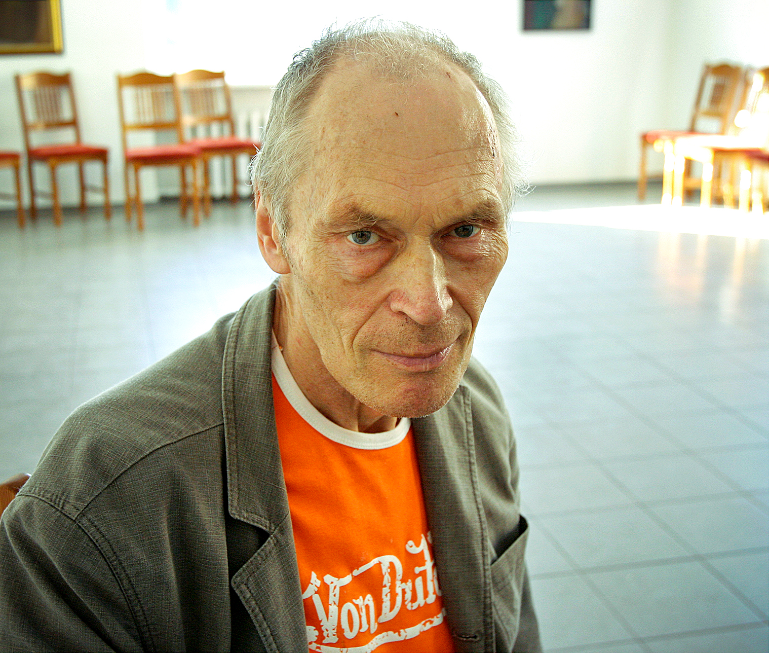 Kunstnik Peeter Mudist oma näituse avamisel Tartu Kunstnike Majas 5. juulil 2004.